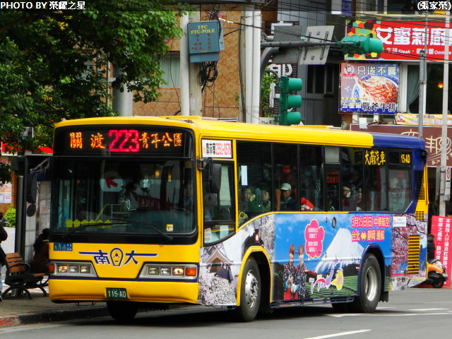 大南汽車223路線.115-AD.ERK2JML 本車已調至302路線!